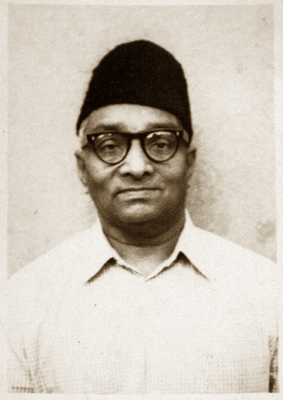 Maldivian politician Muhammad Jameel Didi (1915—1989)